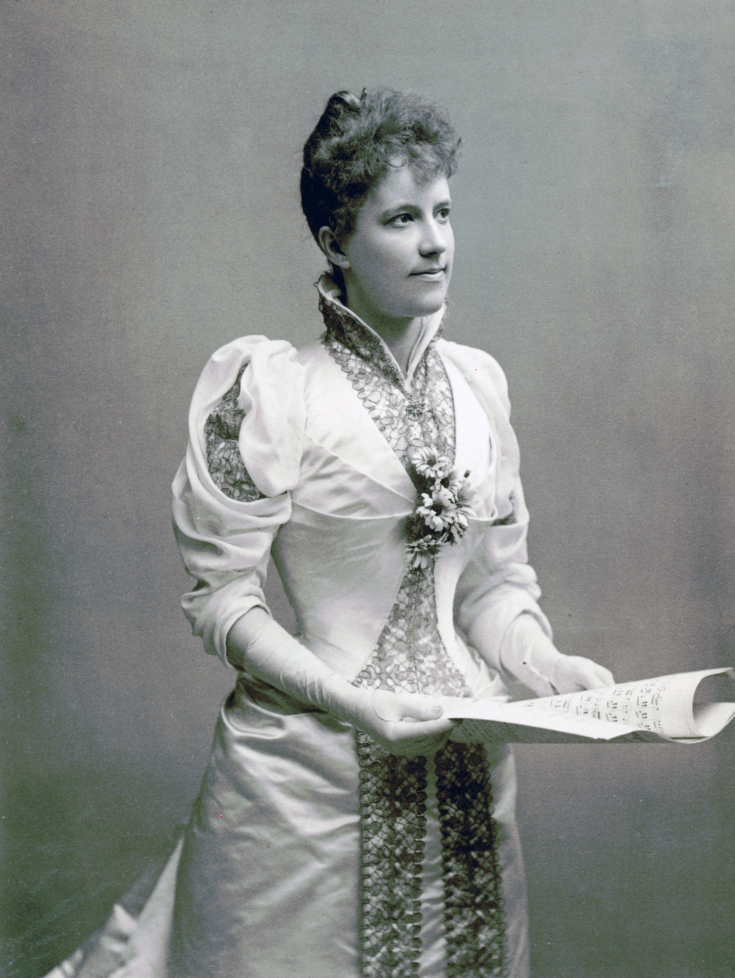 Augusta Öhrström, sångare vid Kungliga Operan 1883